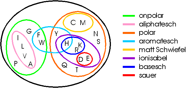 Venndiagramm deen d'Aminosaieren den Egenschaften vun hiere Säiteketten no gruppéiert